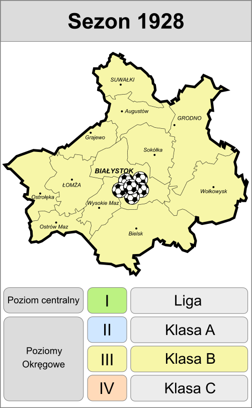 Kluby sportowe w klasie B 1928 rok.